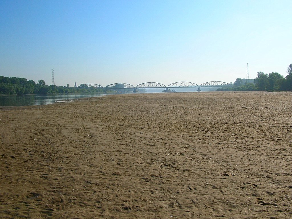 Wisła w Brdyujściu w Bydgoszczy. Widok z mielizny na most fordoński